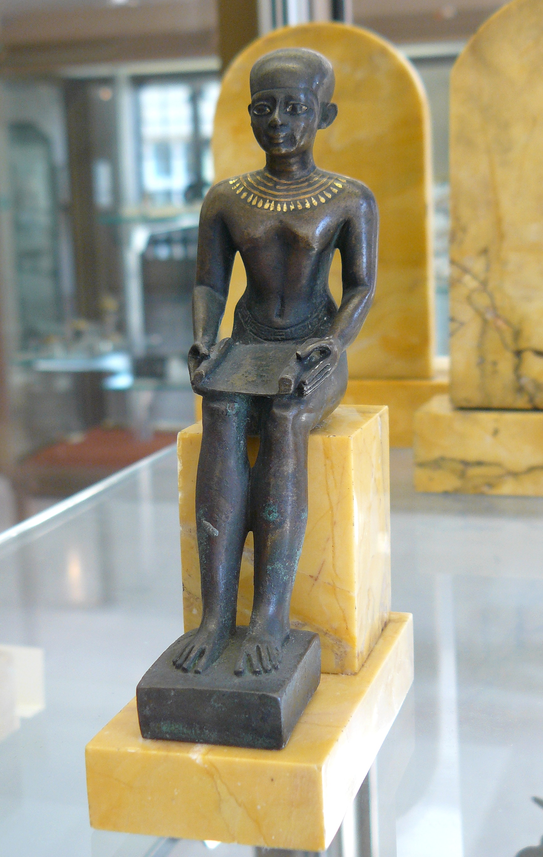 Statuette en bronze à incrustation d'or : Imhotep - Égypte entre le Ve et le Ier siècle av. J.C. - hauteur environ 20 cm - Cabinet des médailles, ancienne collection Caylus, puis Louis XV - n° Inv 65-5646